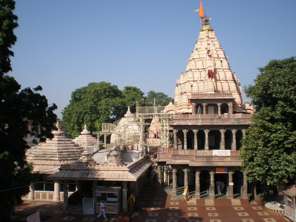 Shri Mahakaleshwer Temple